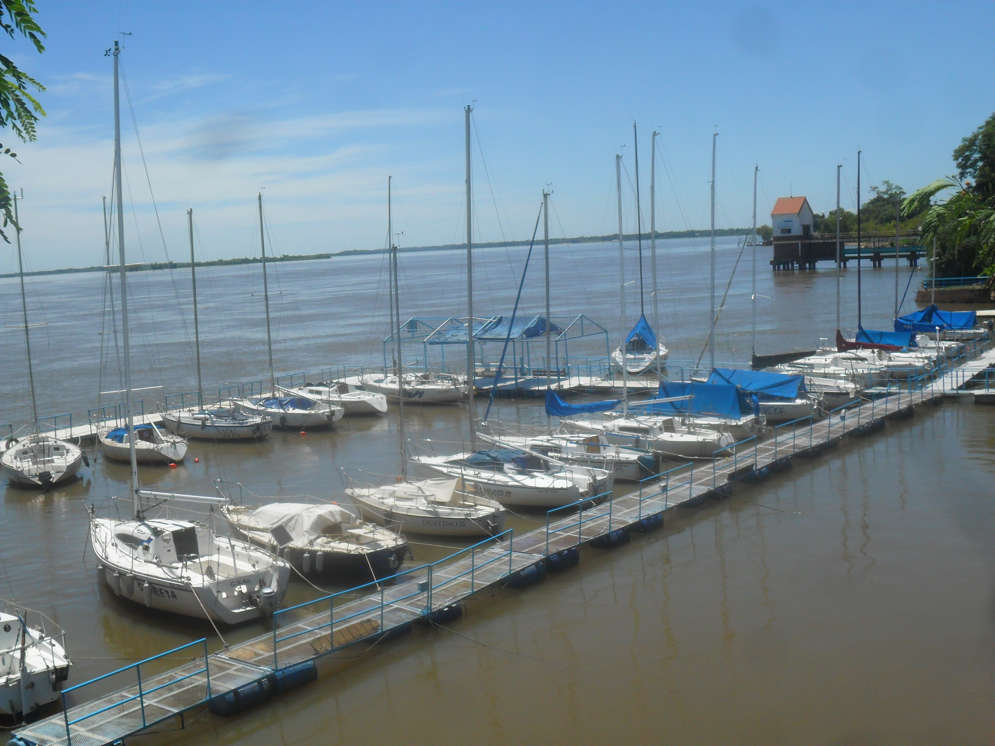 Puerto de Veleros del Club Regatas (2018)